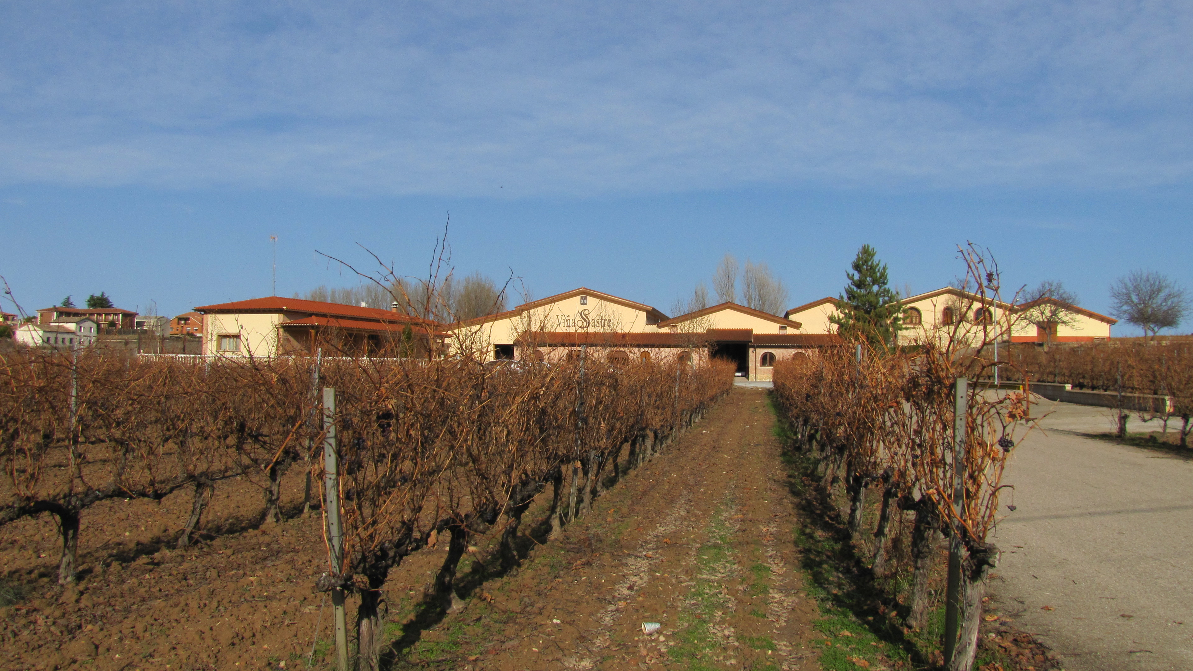 Viñedos dentro de la finca de la Bodega Viña Sastre - Hermanos Sastre en la Ribera del Duero burgalesa, en la población de la Horra (Burgos) España. Con la llegada del invierno las viñas se encuentran sin hojas.